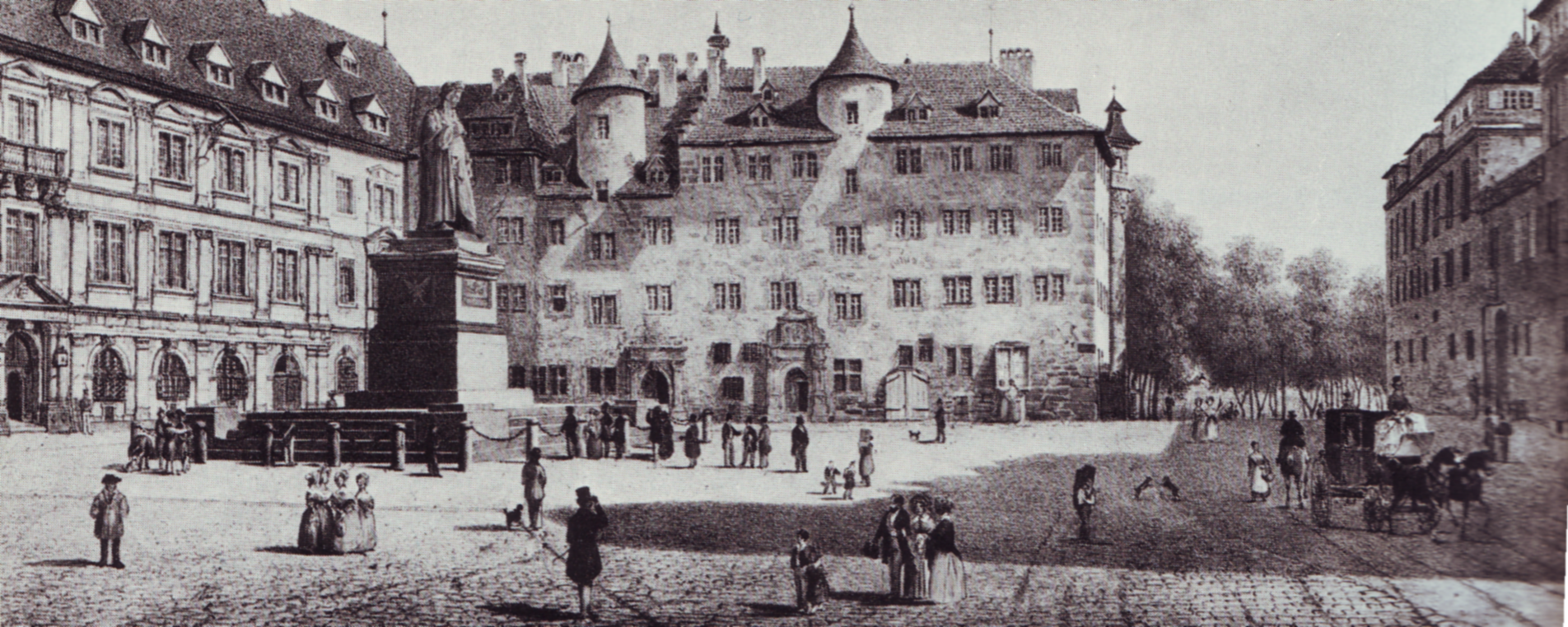 Stuttgart. Alter Schlossplatz (heute Schillerplatz). Alte Litographie.